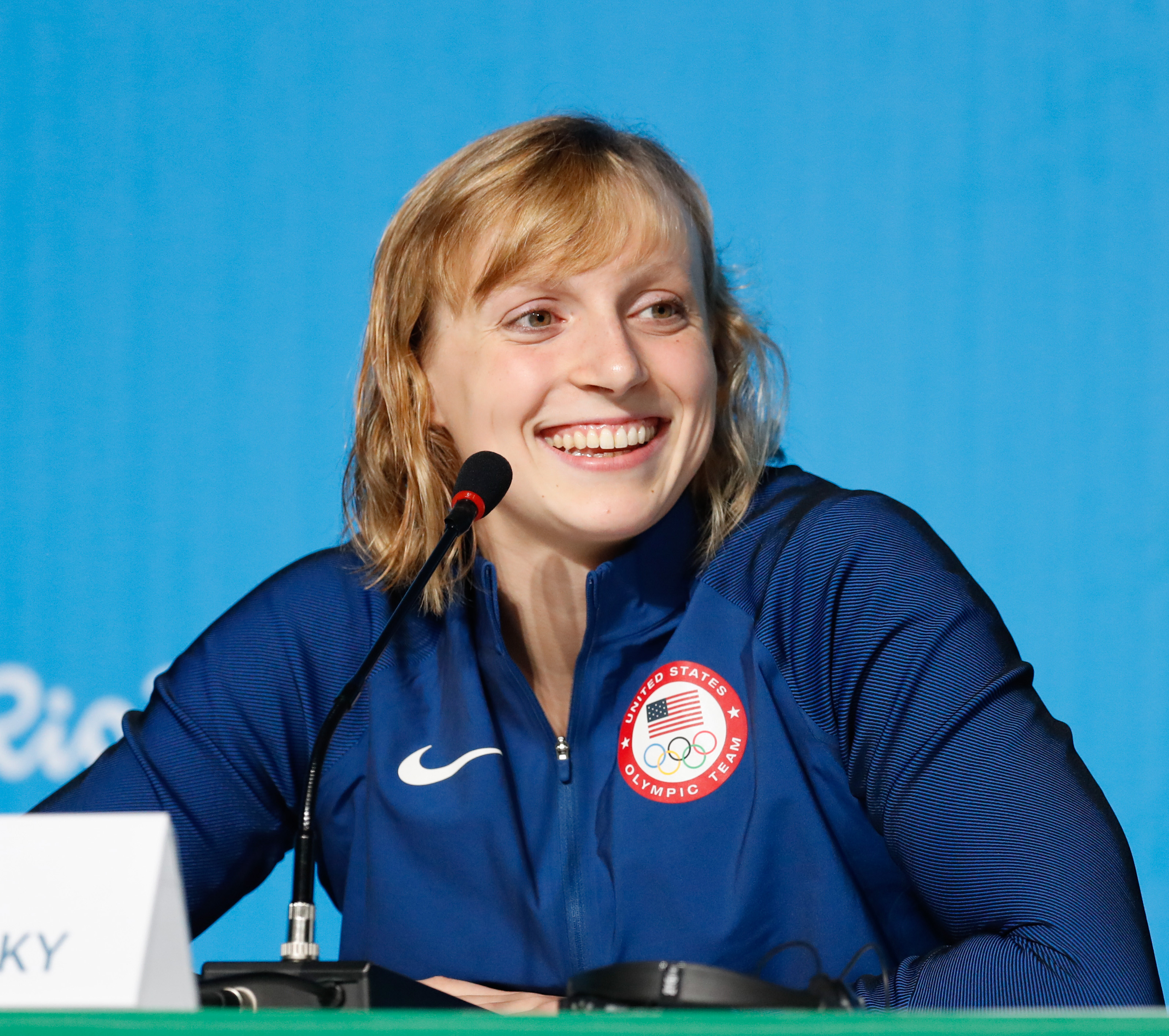 Rio de Janeiro - A nadadora norte-americana Katie Ledecky, medalhista de ouro em Londres, concede entrevista no Parque Olímpico dos Jogos Rio 2016 (Fernando Frazão/Agência Brasil)